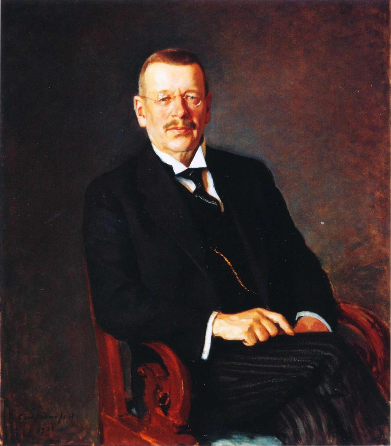 Kansallis-Osake-Pankin tilaama muotokuva eläkkeelle jääneestä pääjohtajastaan Juho Kusti Paasikivestä (1870–1956).